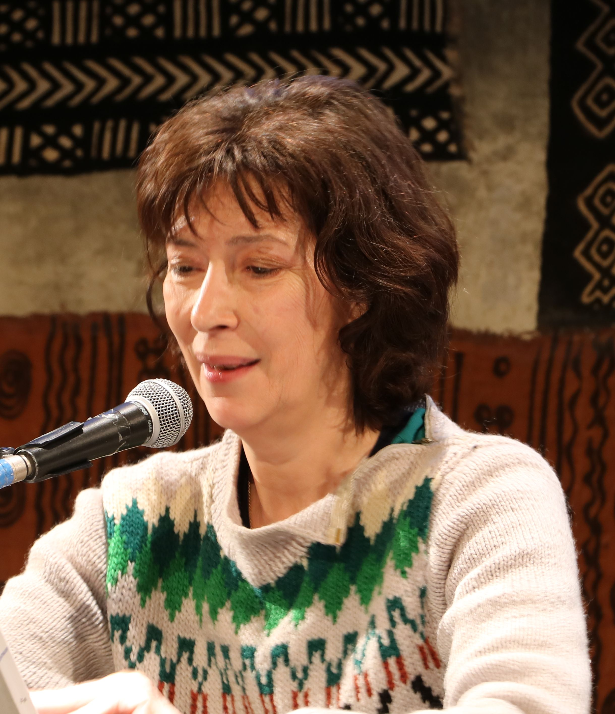 Anne Alvaro - Festival Atlantide - Lieu Unique - Nantes - 5 mars 2017